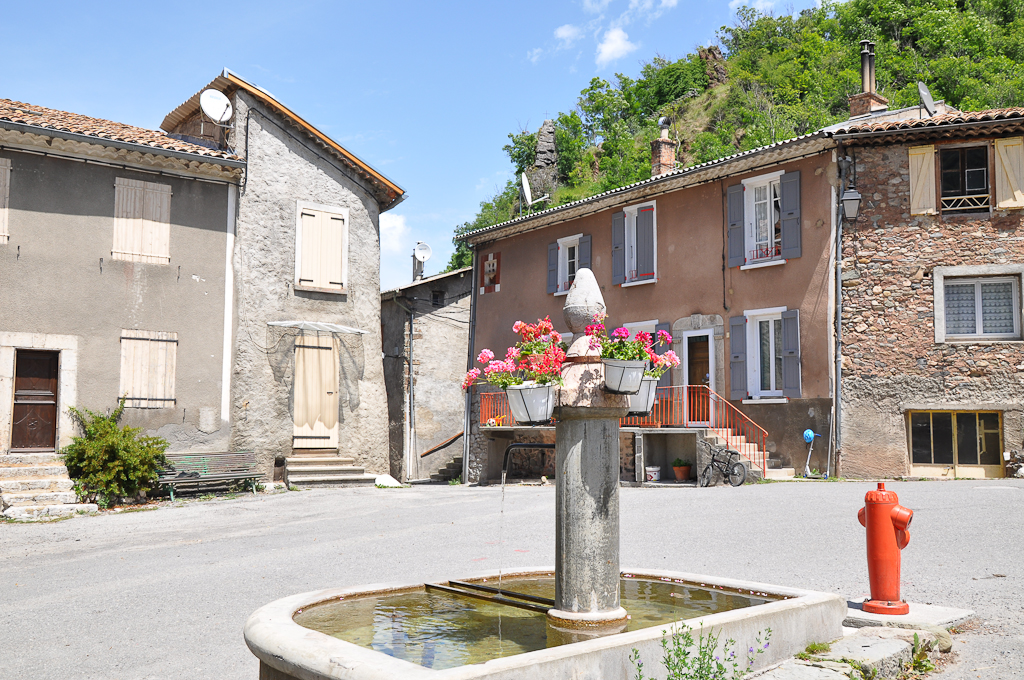 Place et fontaine à Faucon-du-Caire